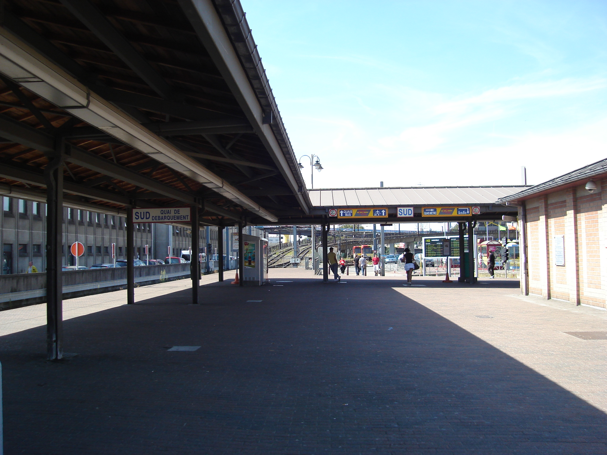 Quai de débarquement de la station de métro Sud.